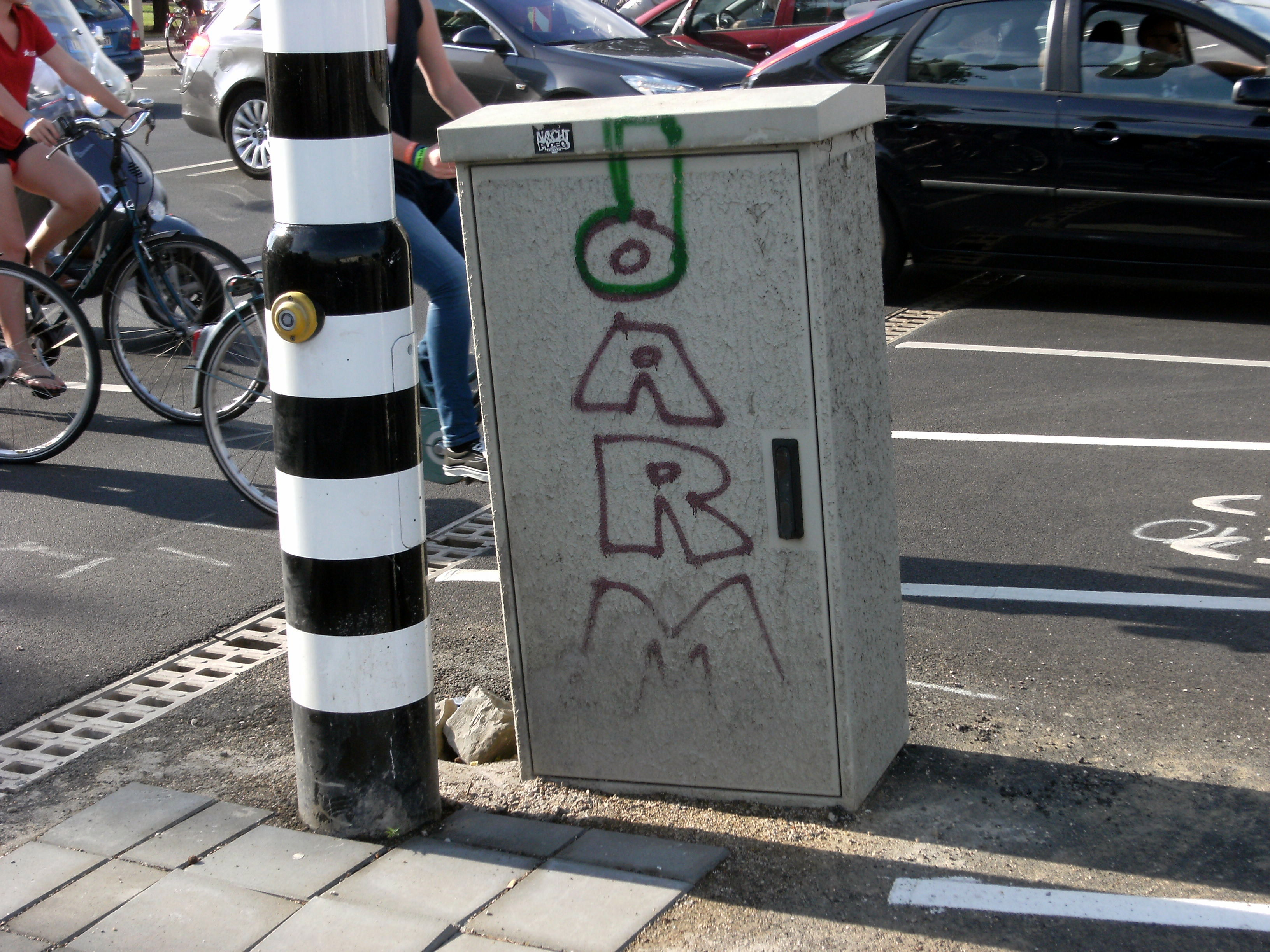 Maastricht 2012 stoplicht en electriciteitskastje met graffiti